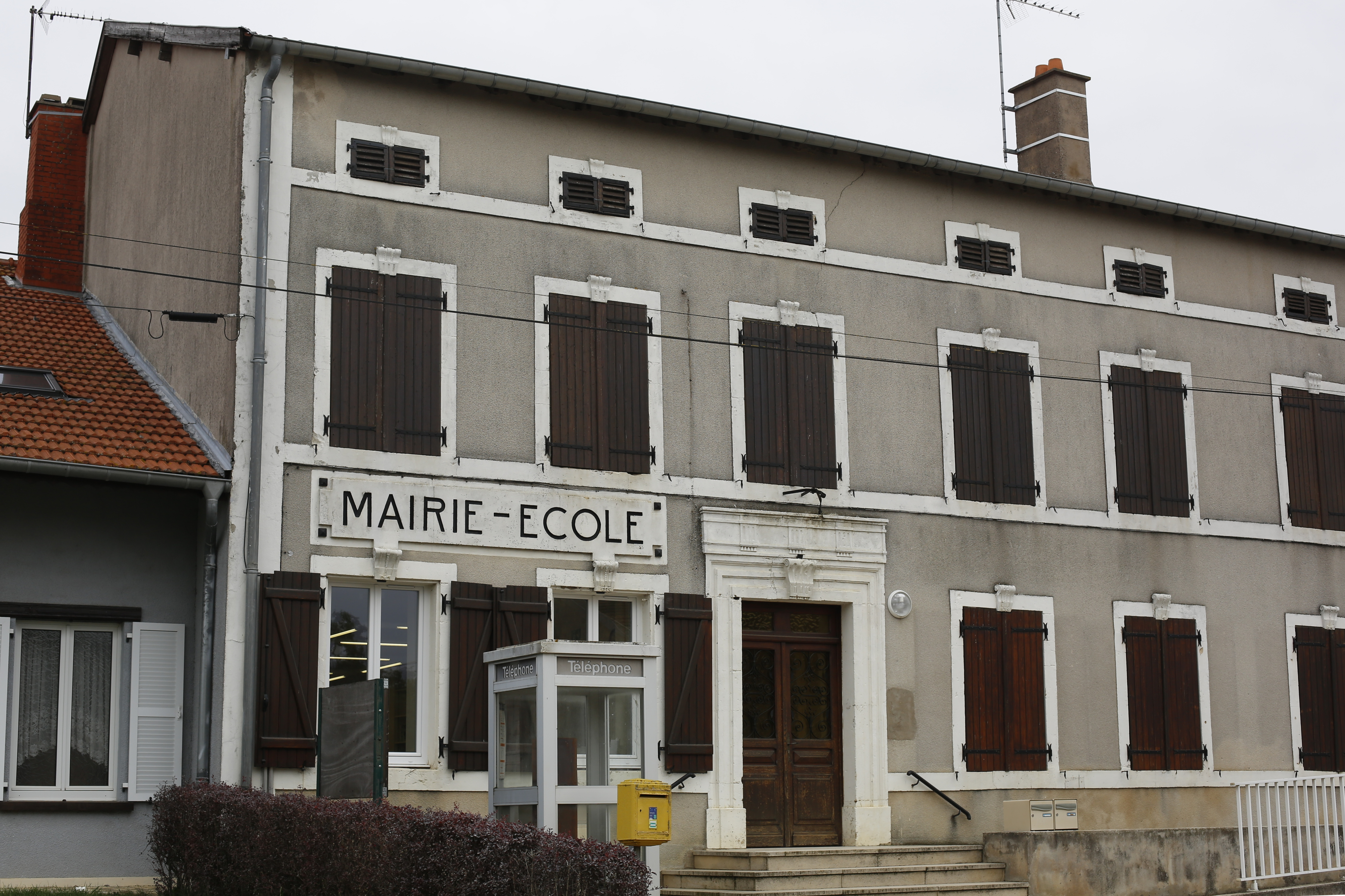 Mairie-école de Jonville-en-Woëvre.